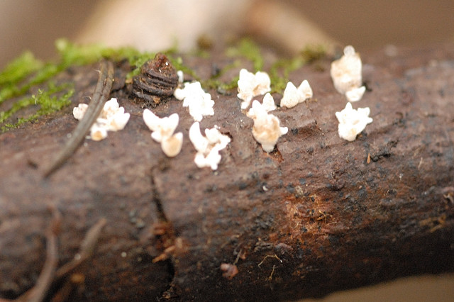 Mucronella calva from Commanster, Belgium.